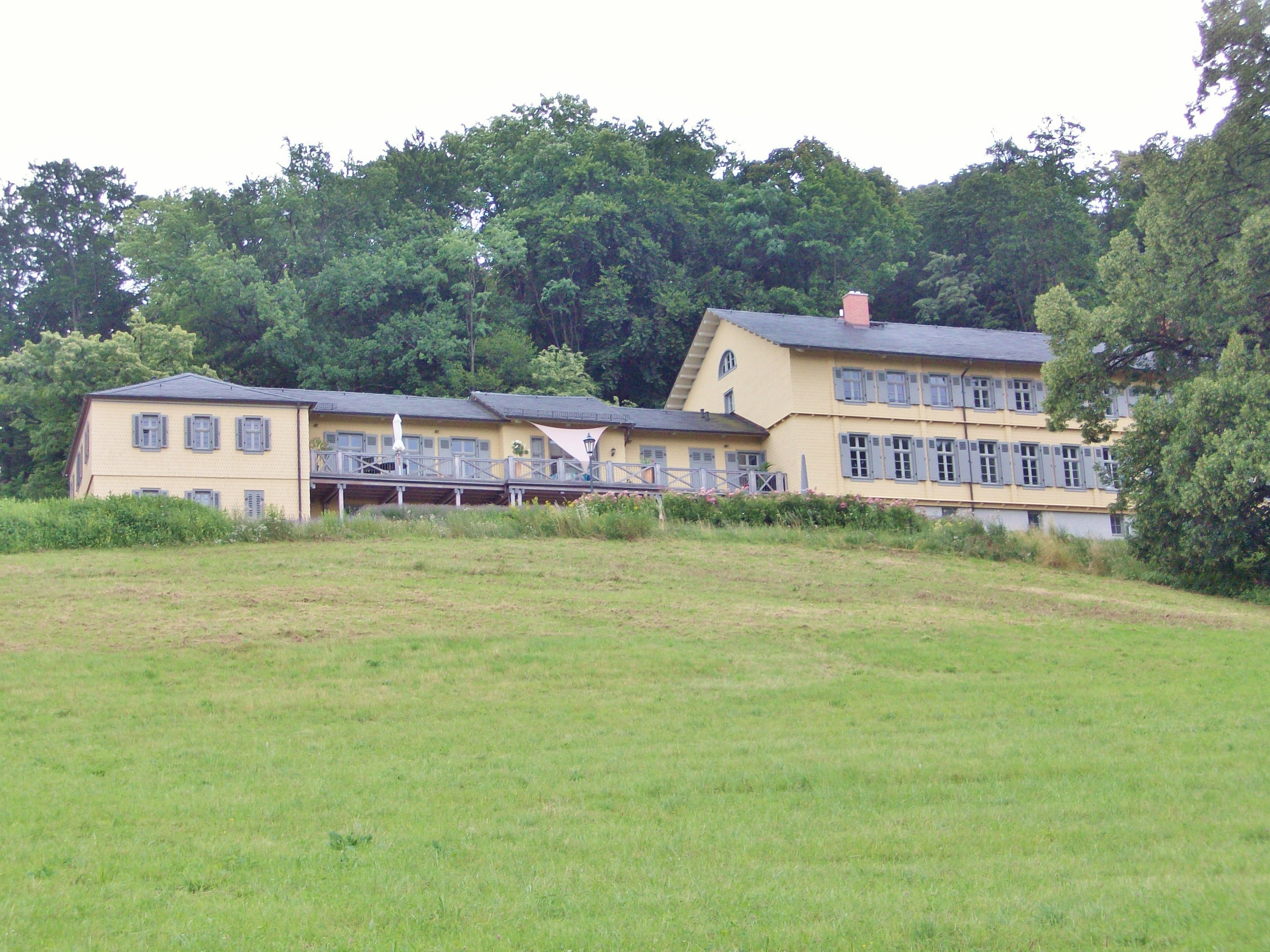 Das Haupthaus des Seeheimer Schlosses